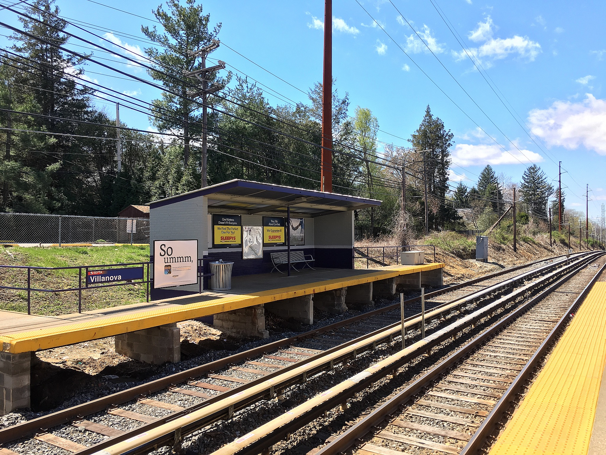 Villanova Station - NHSL